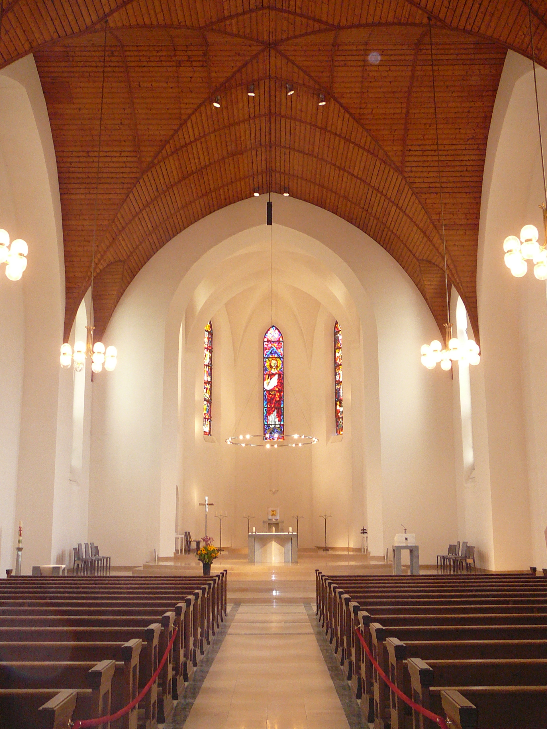 Römisch-katholische Pfarrkirche Herz Jesu Zürich-Oerlikon, Altarraum gestaltet von Josef Caminada, Zürich